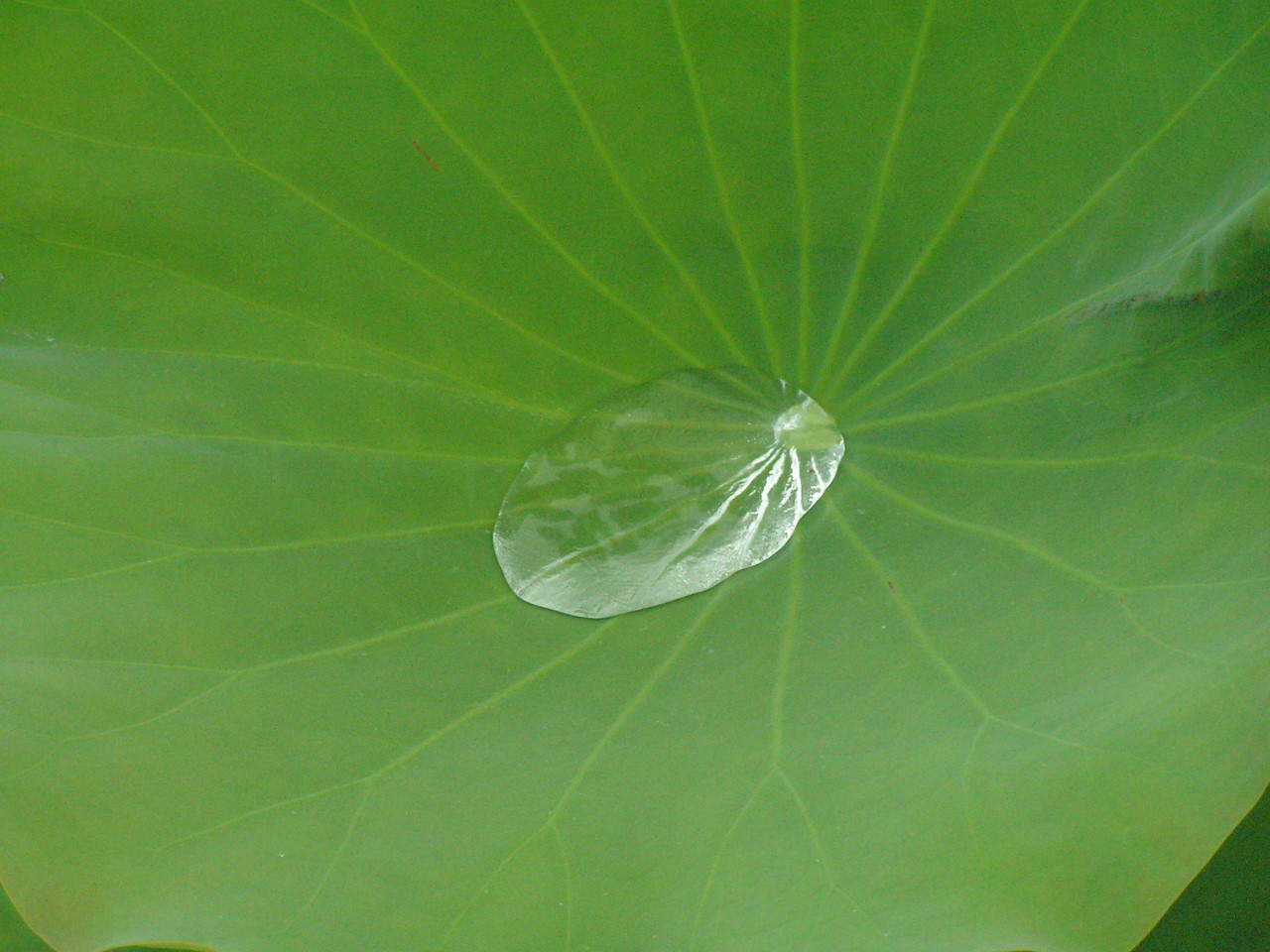 大賀ハス 【おぉたむ すねィく探検隊】写真部門 担当 大原佳苗 ～photo by Autumn Snake